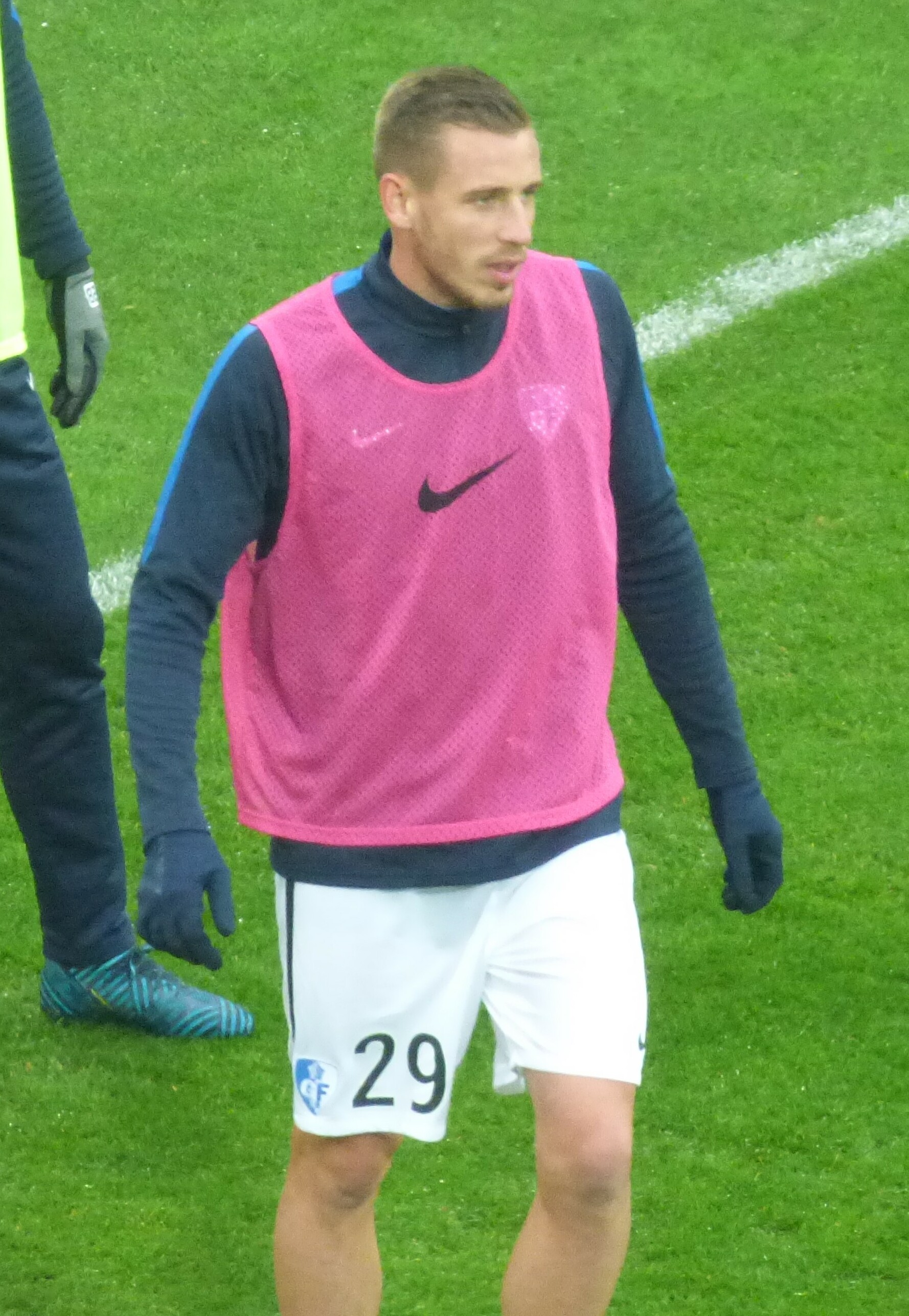 Pierre Gibaud avant le match RC Lens / Grenoble Foot 38, le 24 novembre 2018, comptant pour la quinzième journée du championnat de France de football de Ligue 2 2018-2019, au Stade Bollaert-Delelis.